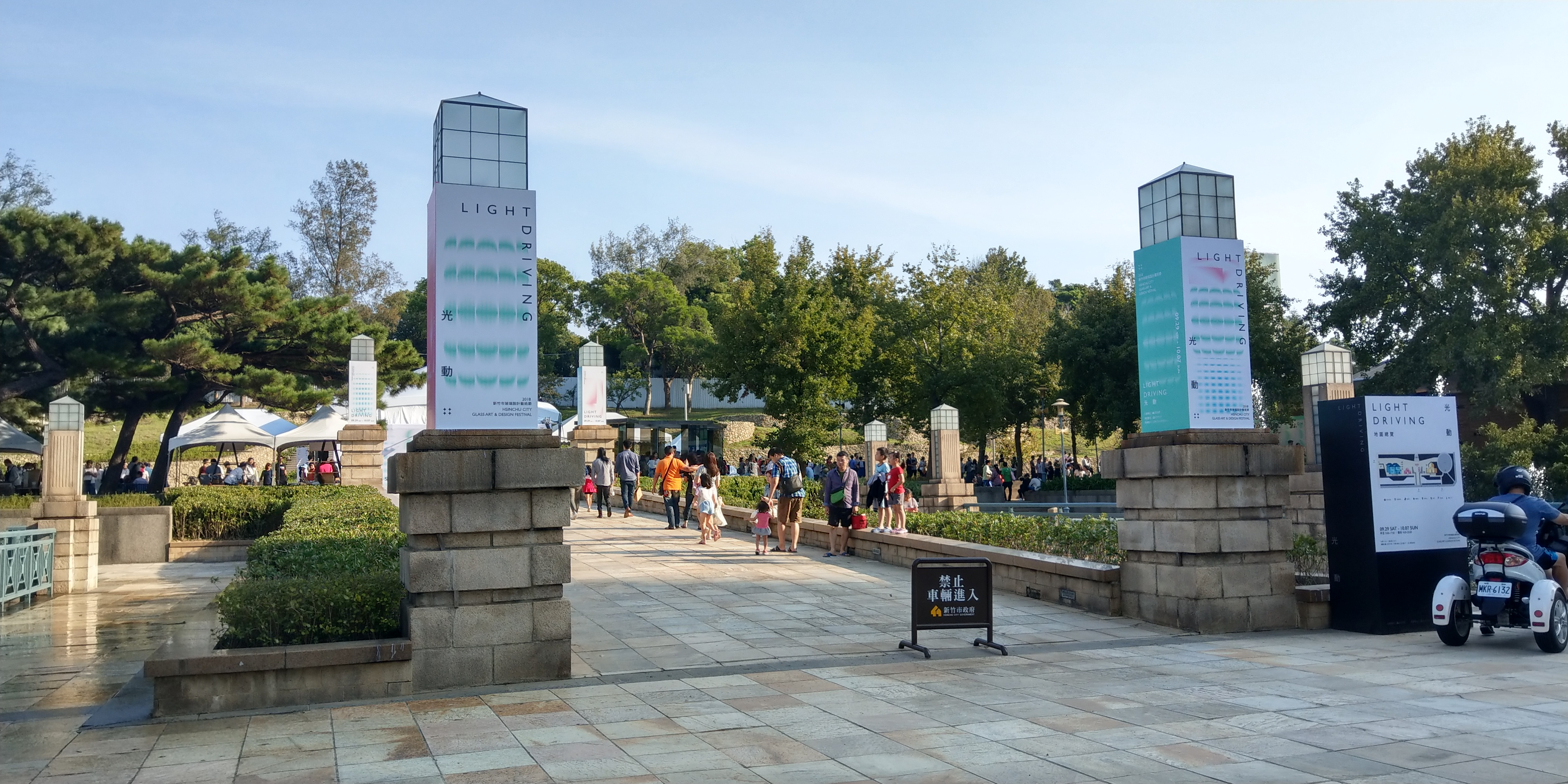 整修後的新竹公園，此時同步舉辦2018新竹市玻璃設計藝術節